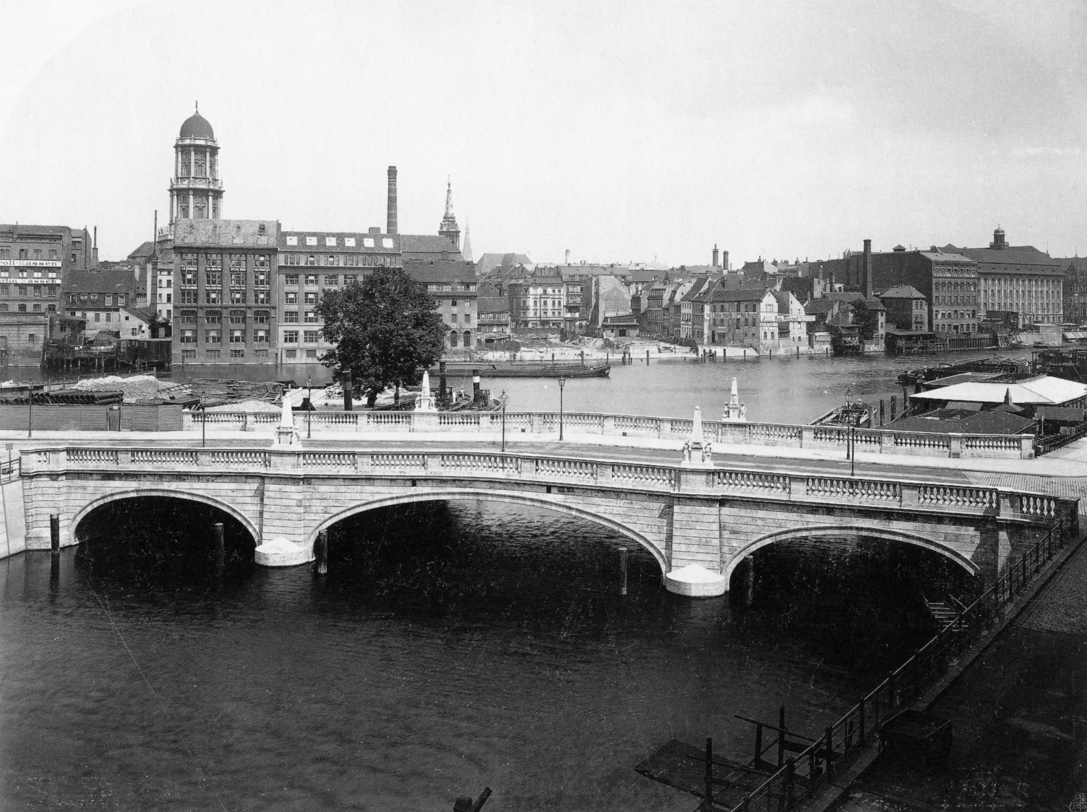 Inselbrücke über den Spreekanal in Berlin